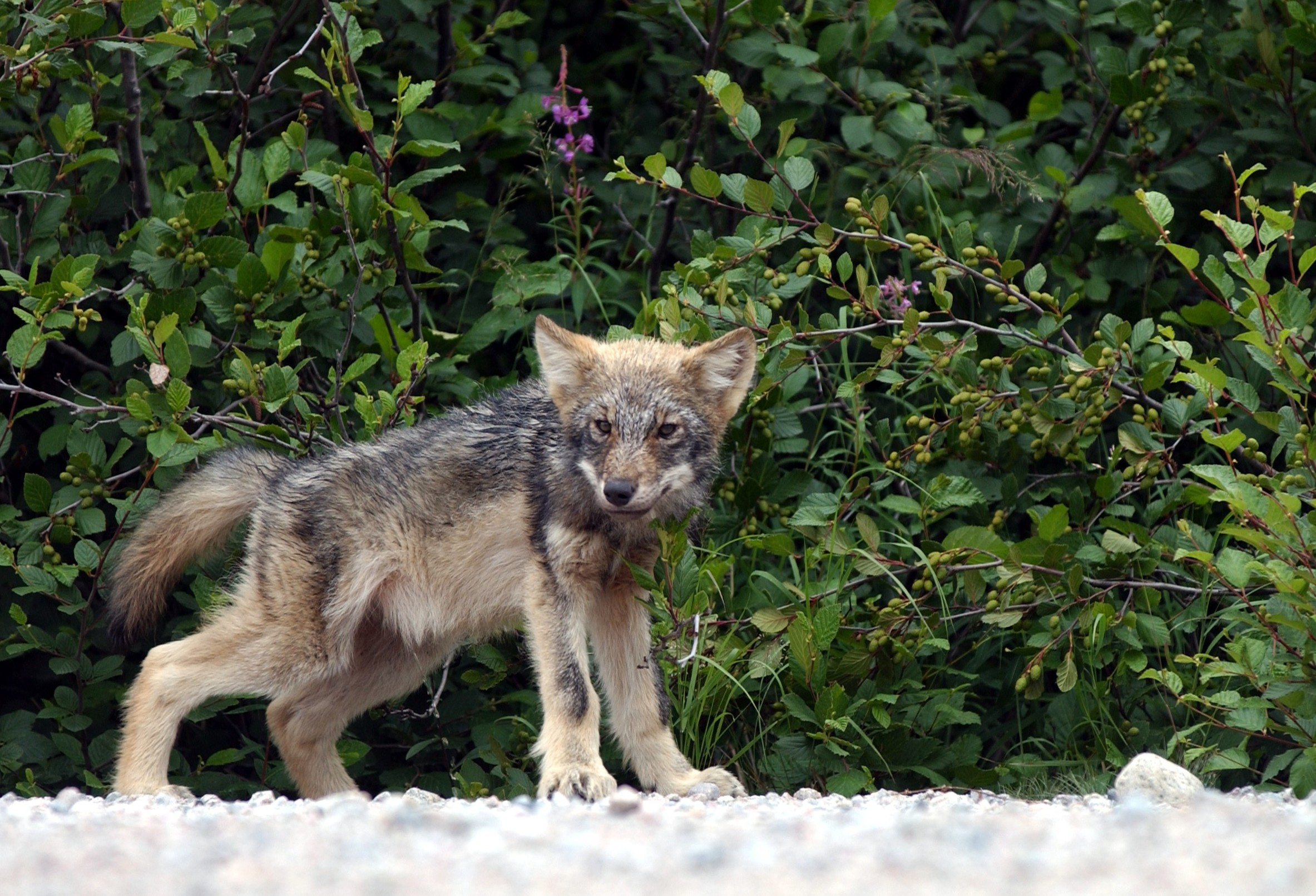 Un petit pipi, ça fait du bien !